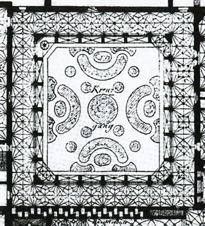 Karl Albrecht Haupt, Planta do Mosteiro dos Jerónimos, Claustro, c. 1880